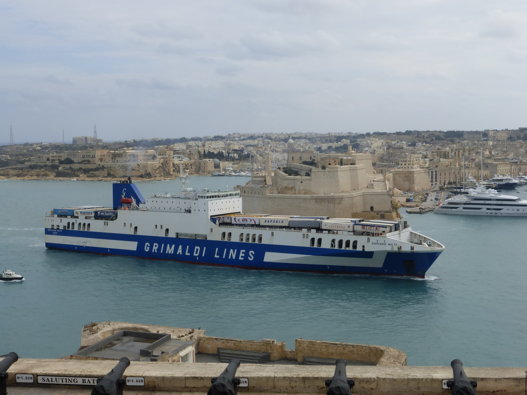 "Eurocargo Malta" der Grimaldi Lines beim Einlaufen in den Grand Harbour von Valletta (Malta)